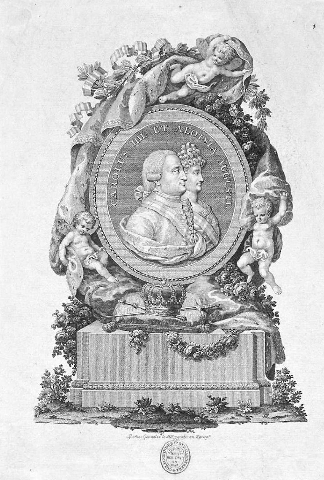 Carolus IIII et Aloisia Augusti, retrato del rey Carlos IV y de la reina María Luisa, firmado Matheo González lo dibº y grabó en Zaragoza incluido en la obra del conde Sástago, Descripción de los canales imperial de Aragón y real de Tauste, 1796